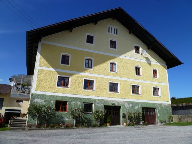 Weiffendorf-Gasthaus